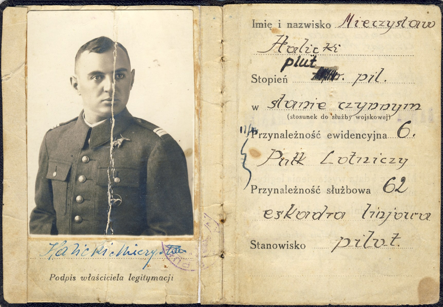 Legitymacja osobista Mieczysława Halickiego 1